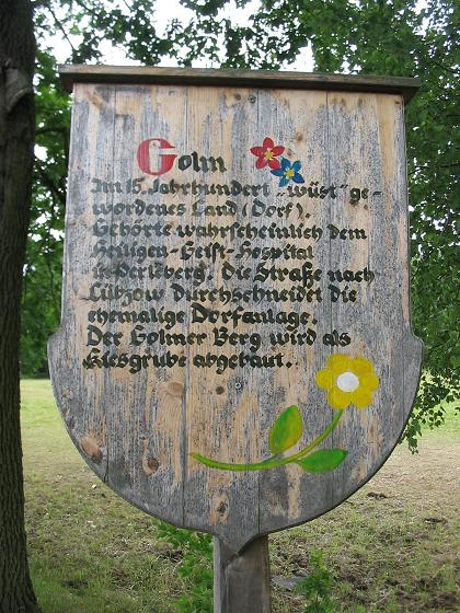 Schild einer Wüstung namens Golm, bei Perleberg in der Prignitz, Brandenburg